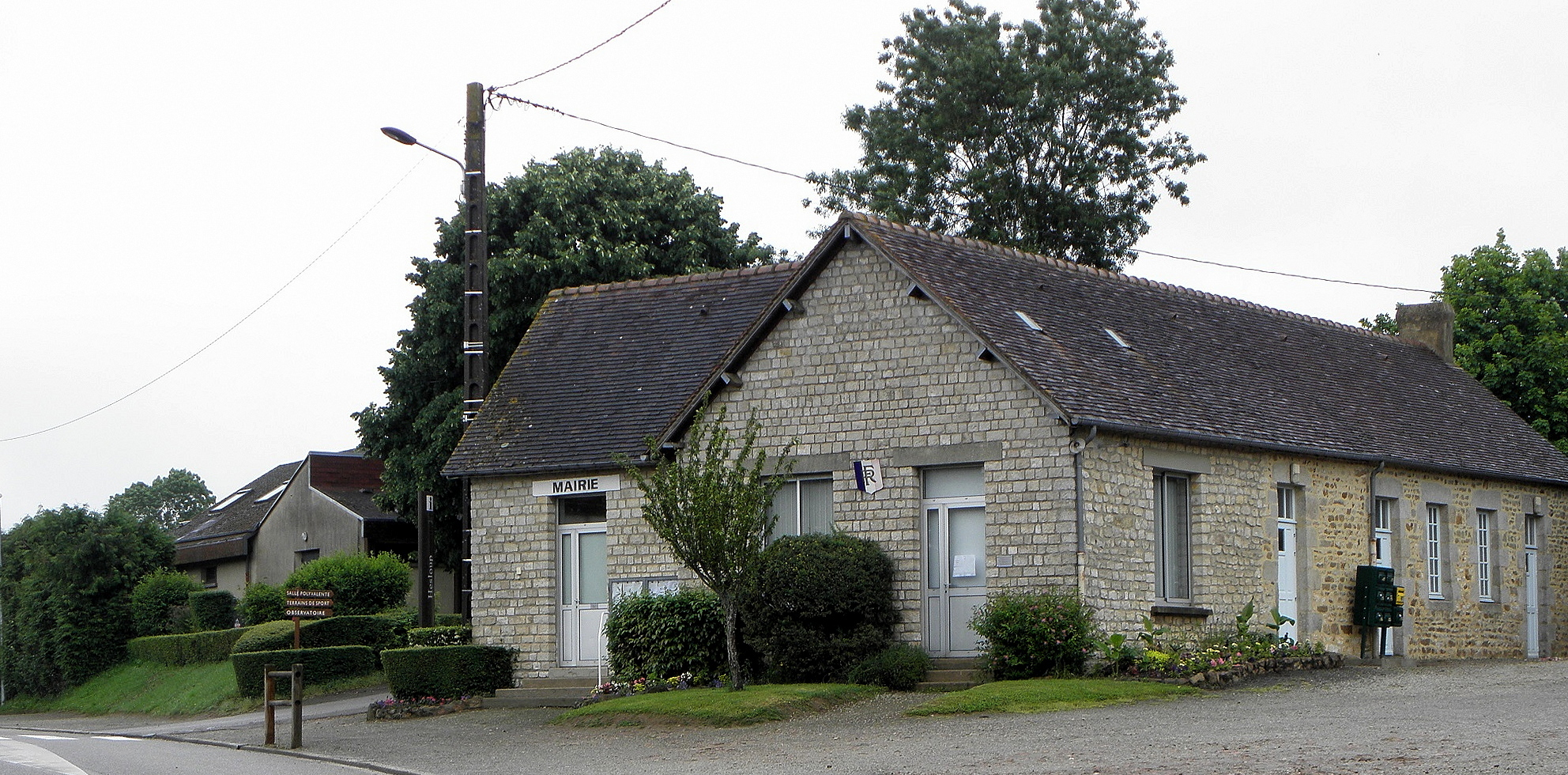 Mairie d'Héloup (61).